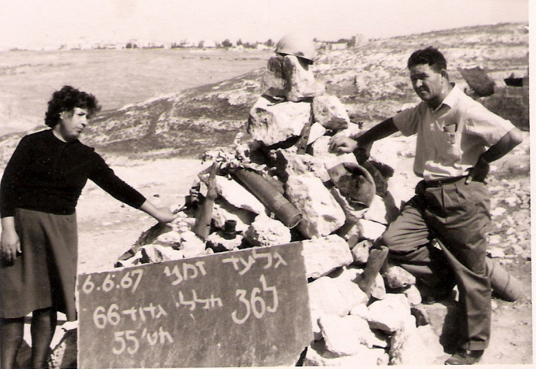 יצחק וטובה לבוביץ, הוריו של החייל אורי לבוביץ, ליד הגלעד הזמני בסיור משפחות שכולות בגבעת התחמושת 1967